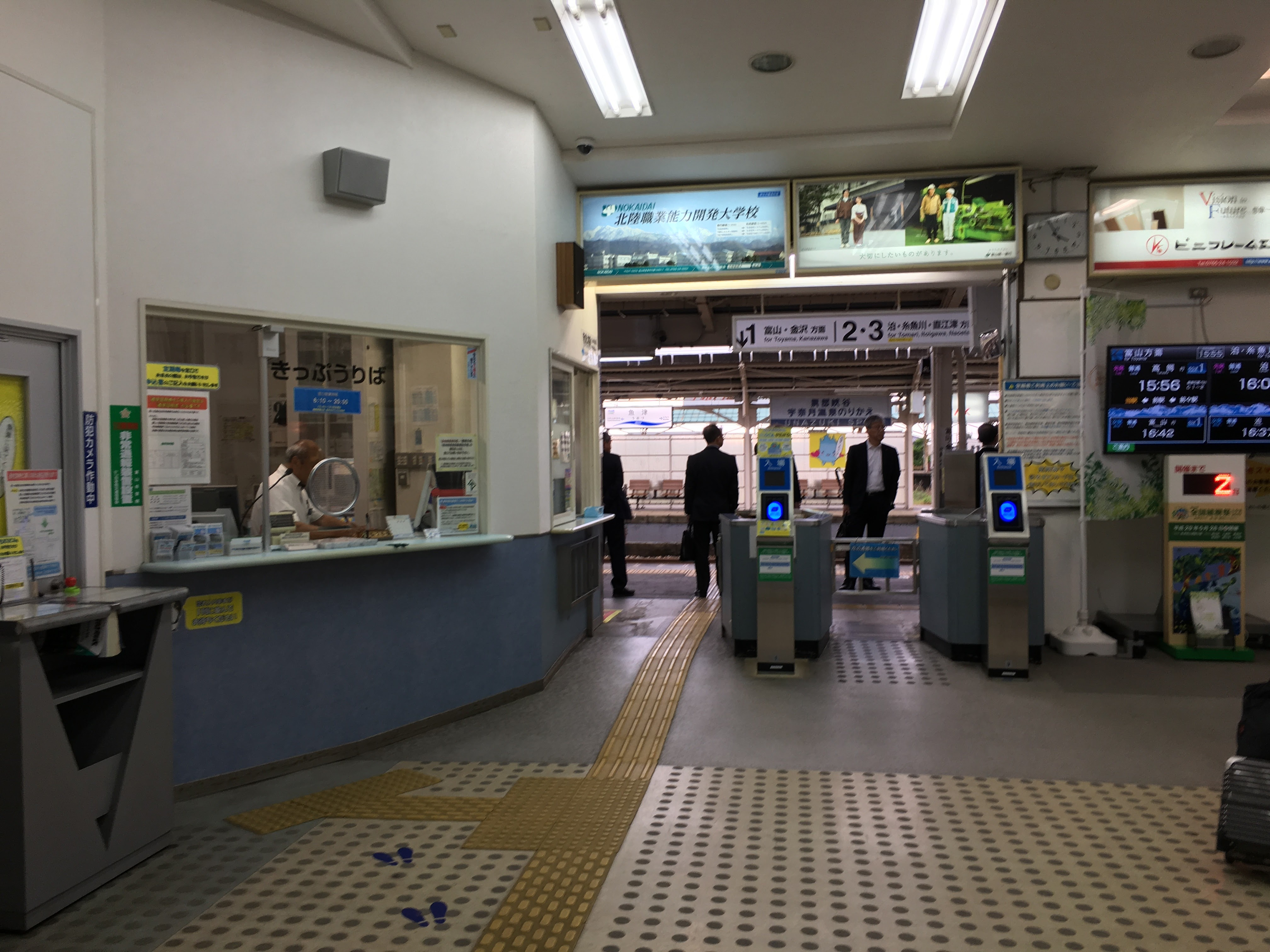 魚津駅改札及び出札口